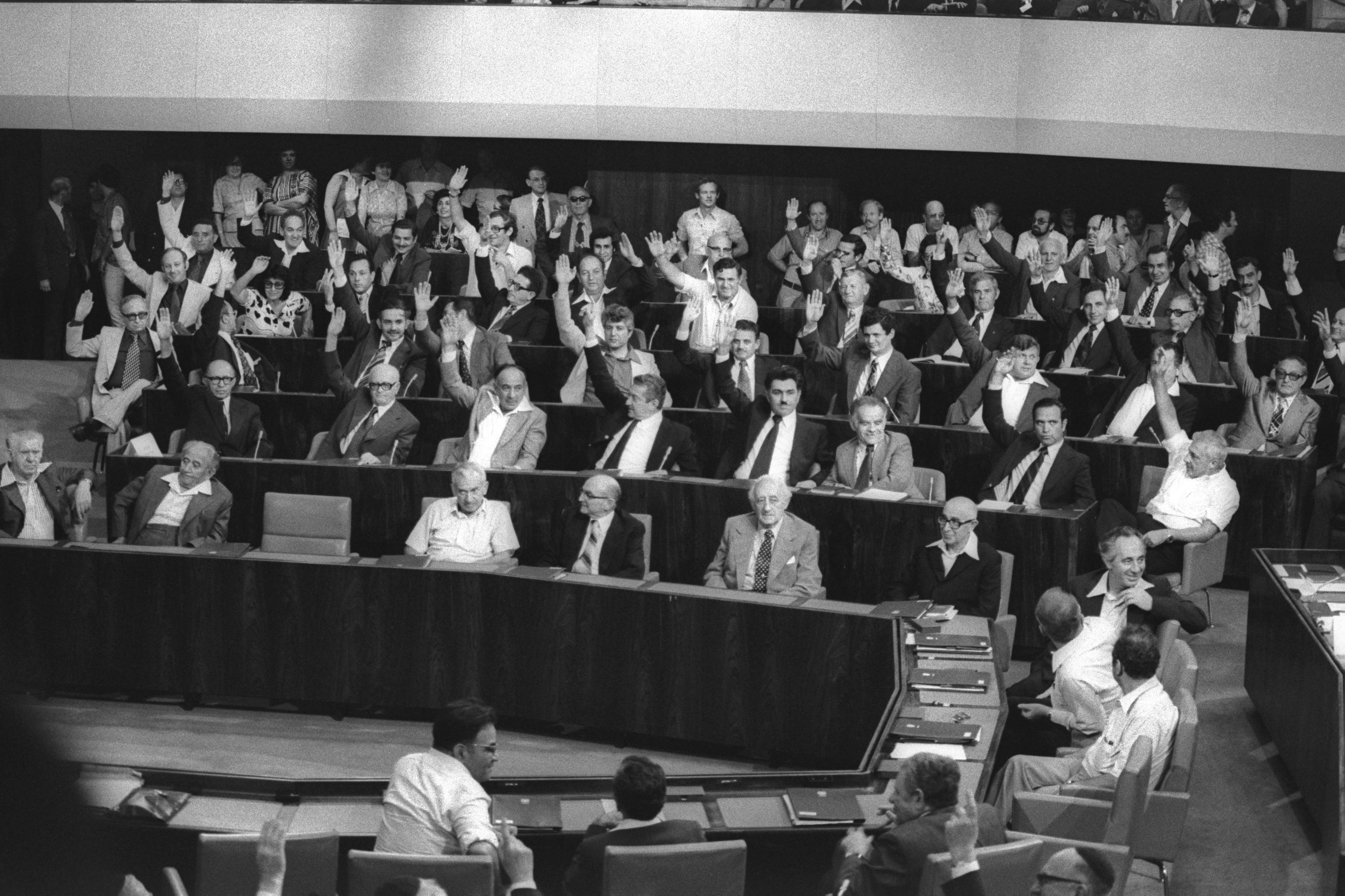 Likud Party MKs raise their hands in favor of Yitzhak Shamir as speaker of the 9th Knesset behind a glum government bench. חברי הליכוד מצביעים עבור יצחק שמיר לתפקיד יו"ר הכנסת, בפתיחת מושב הכנסת התשיעית, בירושלים. Photo: SAAR YAACOV, 13/06/1977